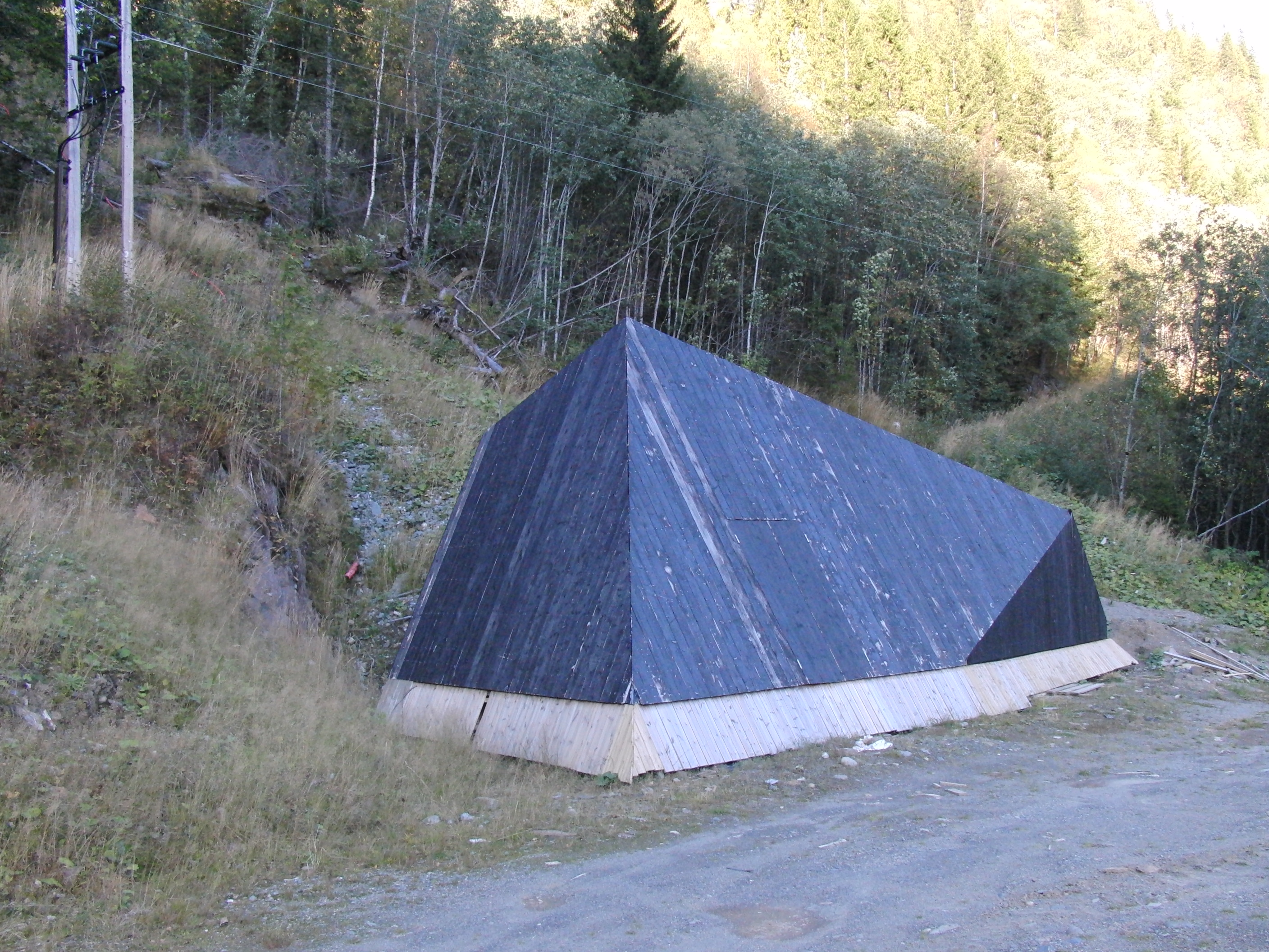 Rabb-bekken kraftverk